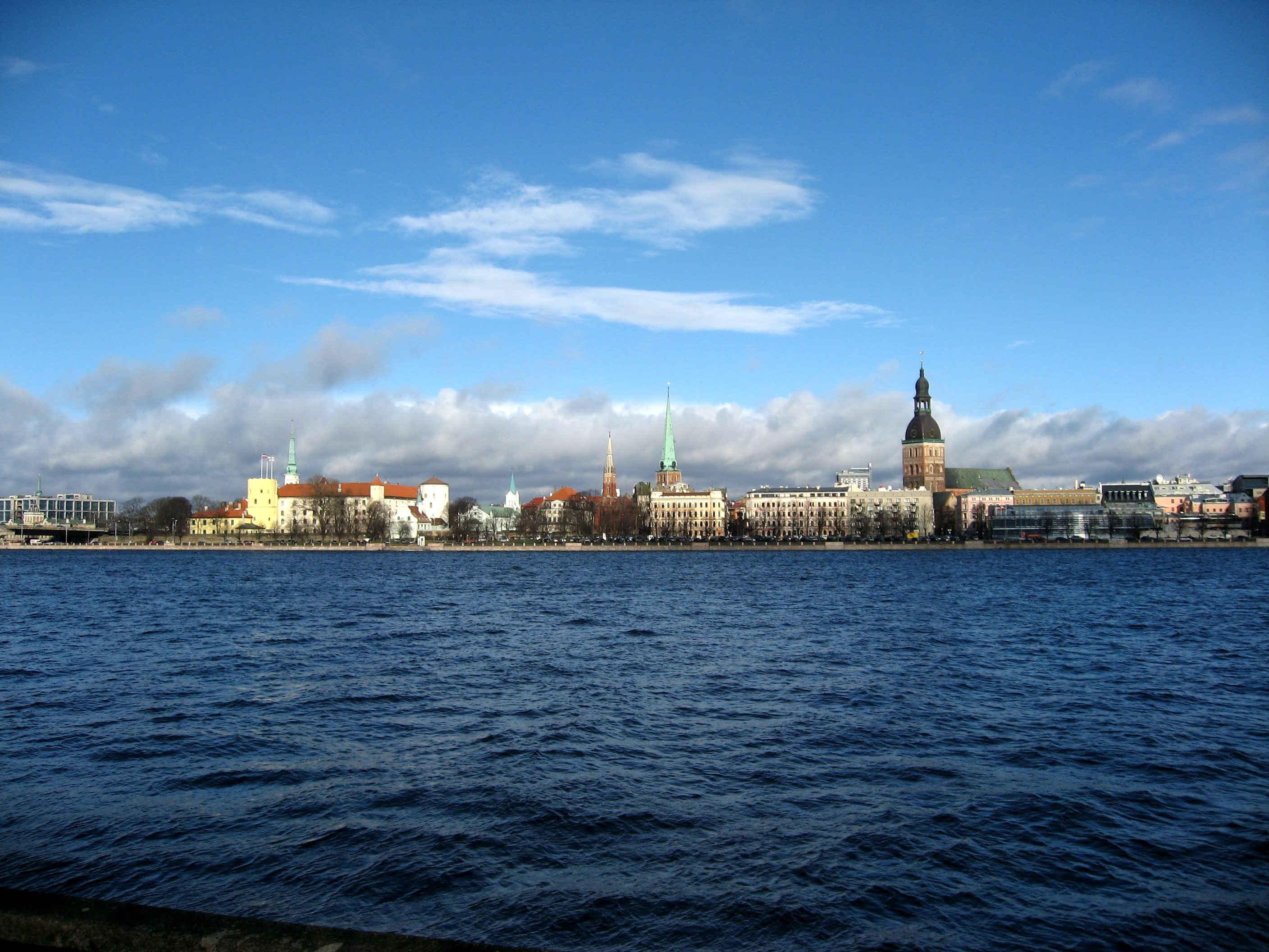 Daugava a Stará Riga